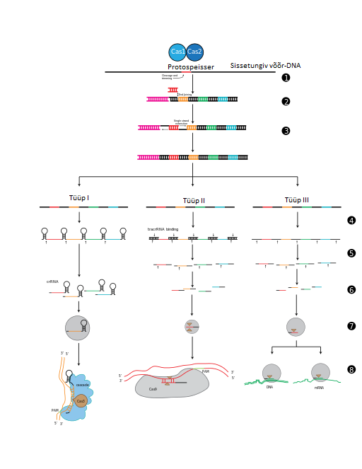 CRISPR immunsuse kolm tüüpi. Cas1 ja Cas2 valgud tunnevad protospeisseite abil ära rakku tunginud võõr-DNA (1). Protospeisser ligeeritakse kordusjärjestusele, mis asuvad põhijärjestuse kõrval (2). Üheahelaline pikendamine parandab CRISPR järjestuse ja duplitseerib kordusjärjestust. crRNA protsessimise ning interferentsi staadiumites esinevad erinevused, mis jagab CRISPR süsteemid kolmeks (3). Cas geenid lõikavad esmast CRISPR transkripti, mille tulemusena saadakse crRNA-d (4). I tüüpi süsteemis lõikavad Cas6e/Cas6f valgud ssRNA ja dsRNA molekule, mis moodustavad juuksenõela struktuure. II tüüpi süsteemis kasutatakse dsRNA moodustamiseks tracrRNA-d; lõikamine toimub Cas9 ja RNaasIII abil. Tüüp III süsteemis kasutatakse Cas6 homoloogi, mis ei vaja lõikamiseks juuksenõela struktuuri olemasolu (5). II ja III tüüpi süsteemides lõigatakse molekule lisaks veel kas 5´ või 3´ otsest, mille tulemusena saadakse küps crRNA (6). Saadud crRNA-d seonduvad Cas valguga, moodustuvad interferentsi kompleksid (7). Tüüp I ja II süsteemides on valgu ja PAM järjestuse interaktsioon kriitilise tähtsusega võõr-DNA lagundamiseks. Tüüp III süsteemis pole seesugune interaktsioon vajalik (8).